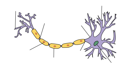 תרשים תא עצב עם חצים וללא תוויות. היפוך התמונה מויקישיתוף